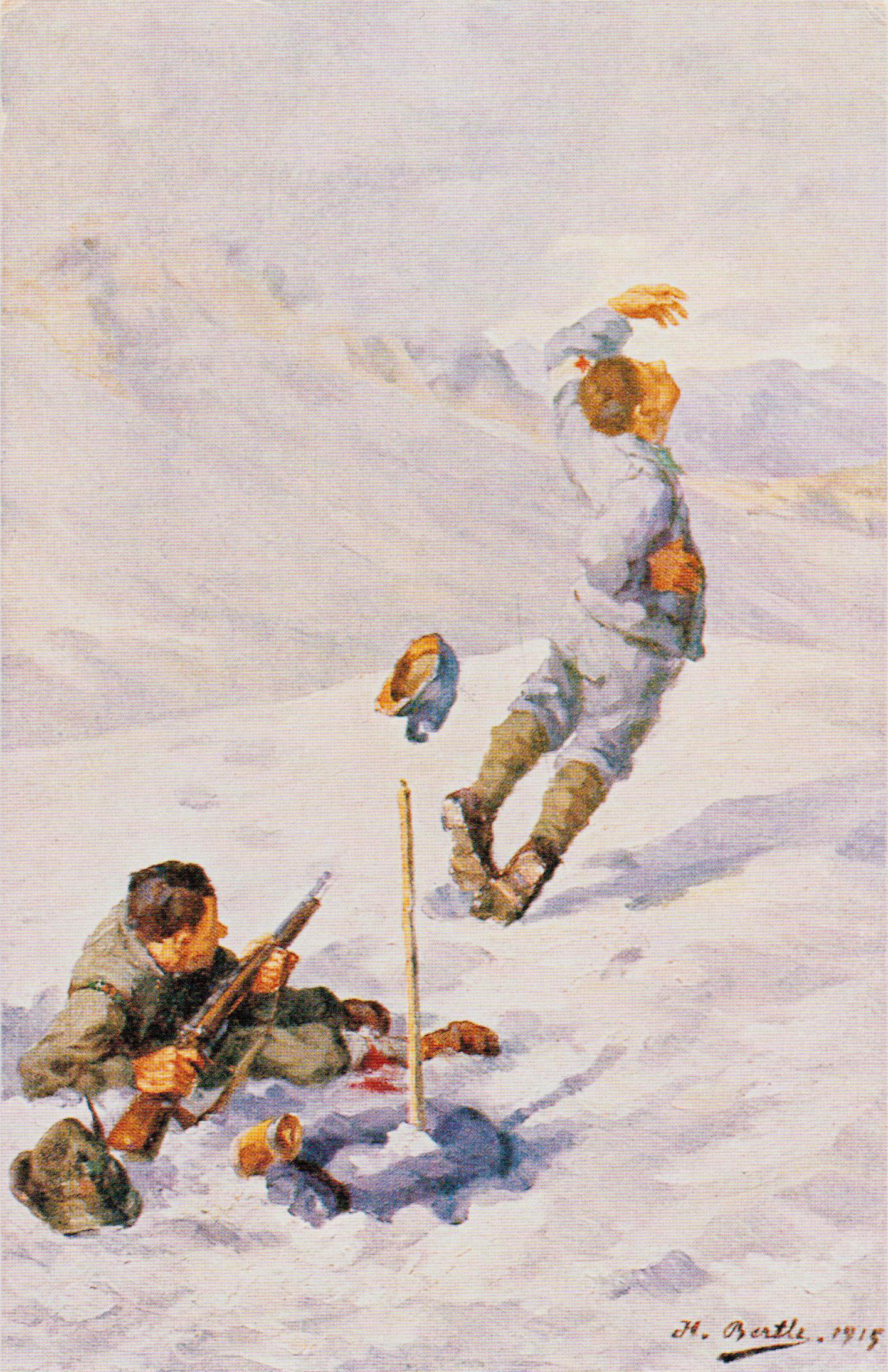 Bild "Verwundeter Alpinist 1915" von 1915